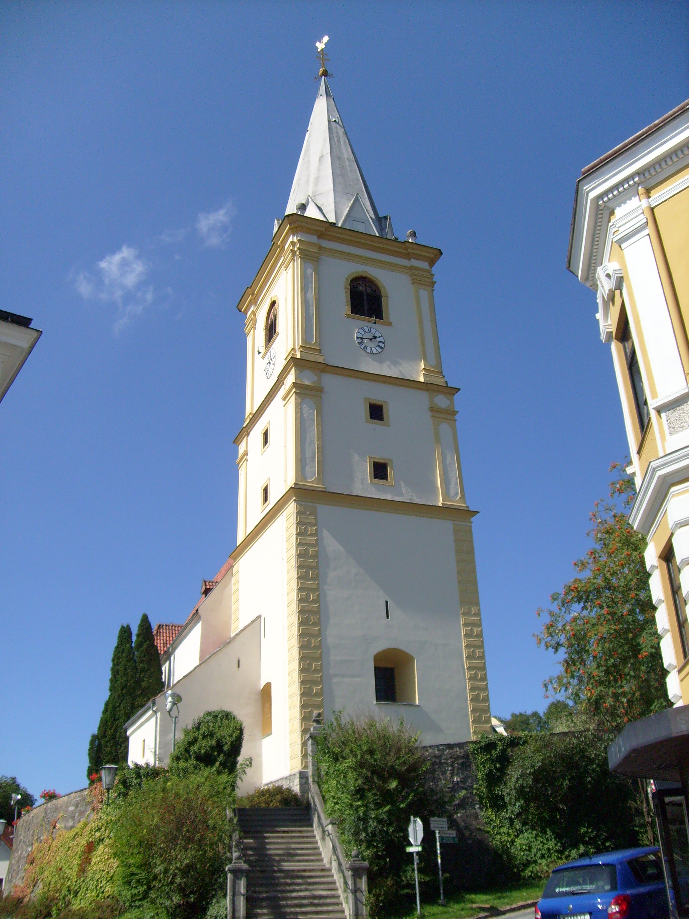 Kath. Pfarrkirche hl. Stephan in Krumbach